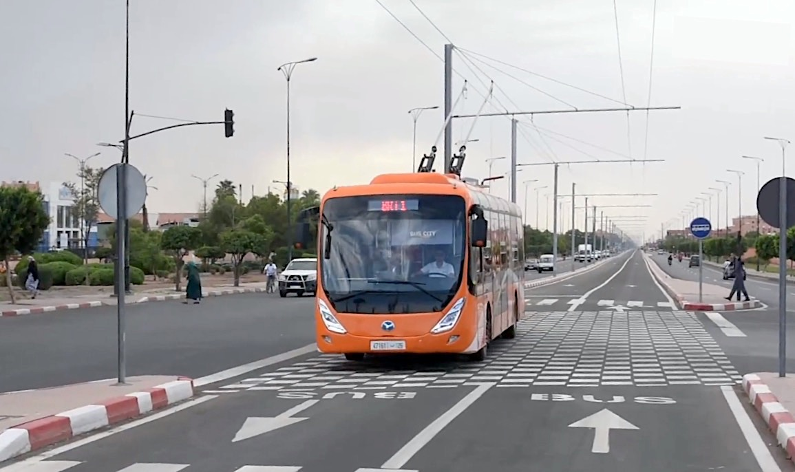 BHNS de Marrakech sur l'avenue d'Essaouira.